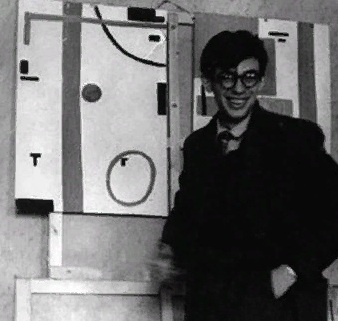 злотников